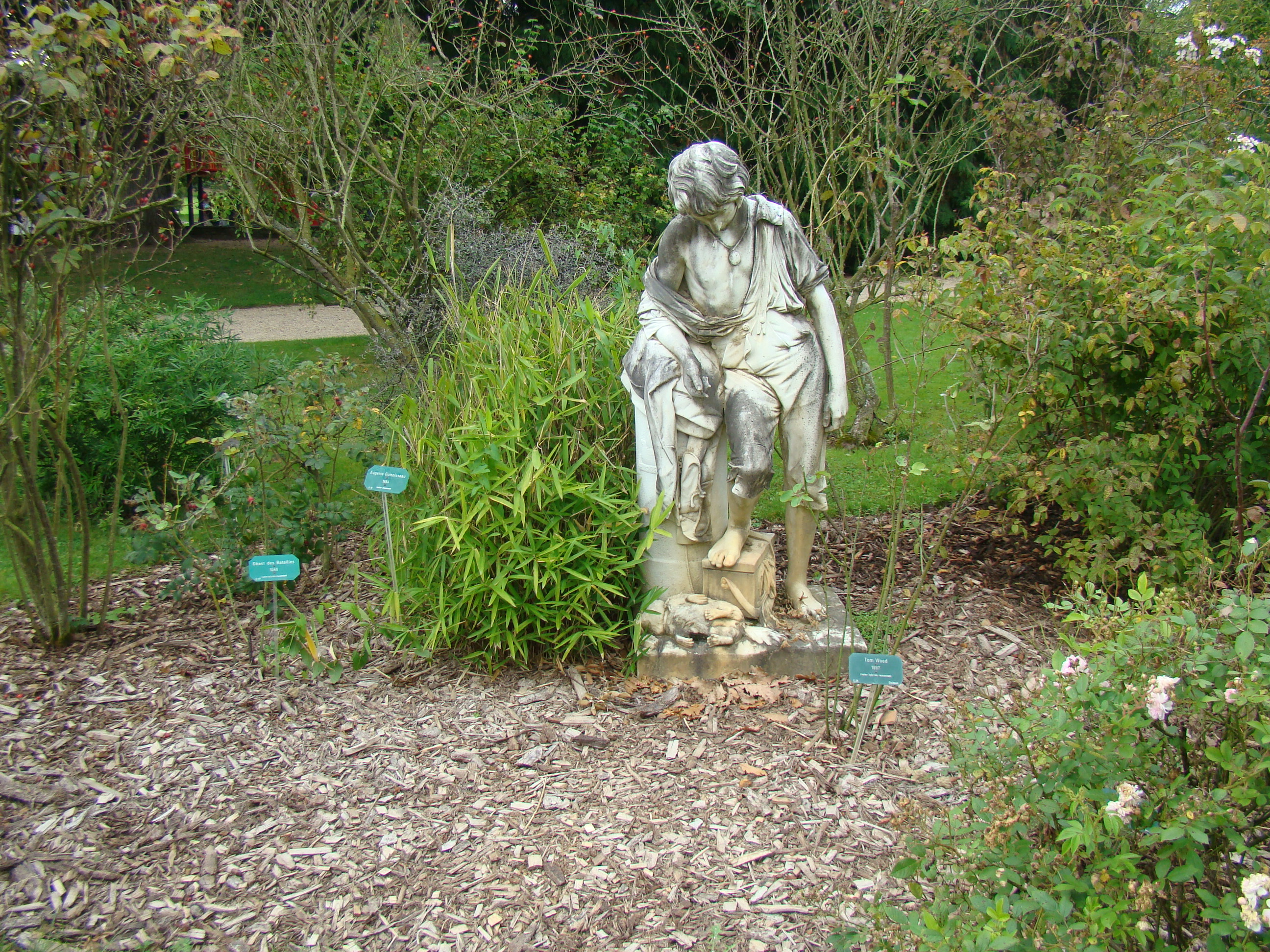 Jeune savoyard pleurant sa marmotte, sculpture de Pierre Gourdel réalisée en 1874, copie de l'originale de son frère Julien Gourdel en 1835.